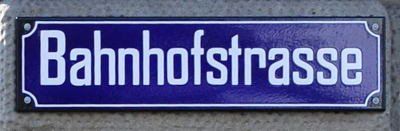 Strassenschild der Bahnhofsstrasse in Zürich